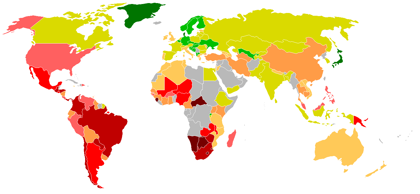 Es wurden lediglich die Farben des Bildes "Bild:World_Map_Gini_coefficient.png" an die in der Tabelle "Liste der Länder nach Einkommensverteilung" angegebenen Werte angepasst. Ich erhebe keine Lizenzansprüche für die Änderungen, sonstige Lizenz wie "Bild:World_Map_Gini_coefficient.png"